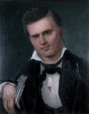 Writer Bjørnstjerne Bjørnson